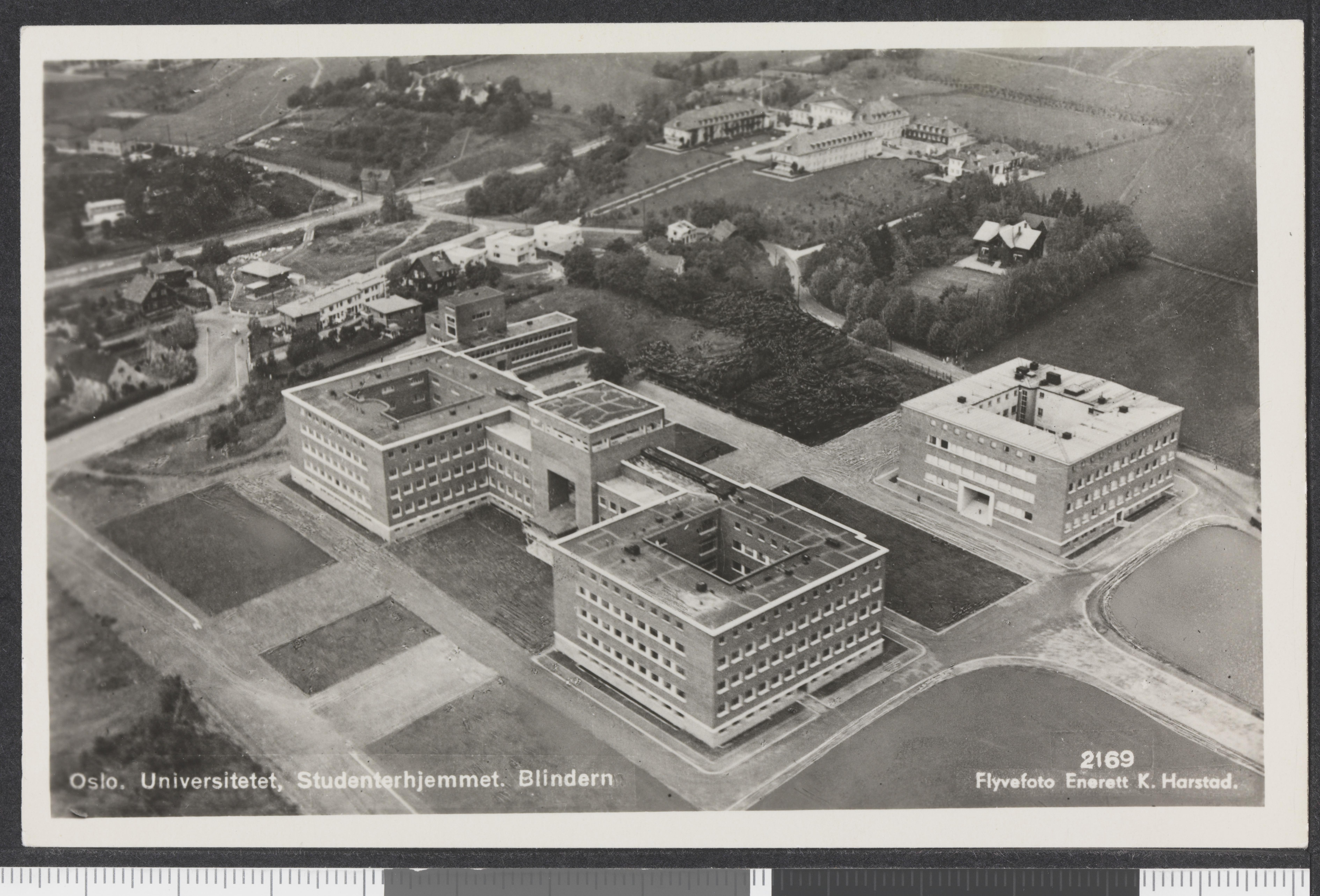 Bildet er hentet fra Nasjonalbibliotekets bildesamling Blindern,Universitetet i Oslo, Oslo, Oslo